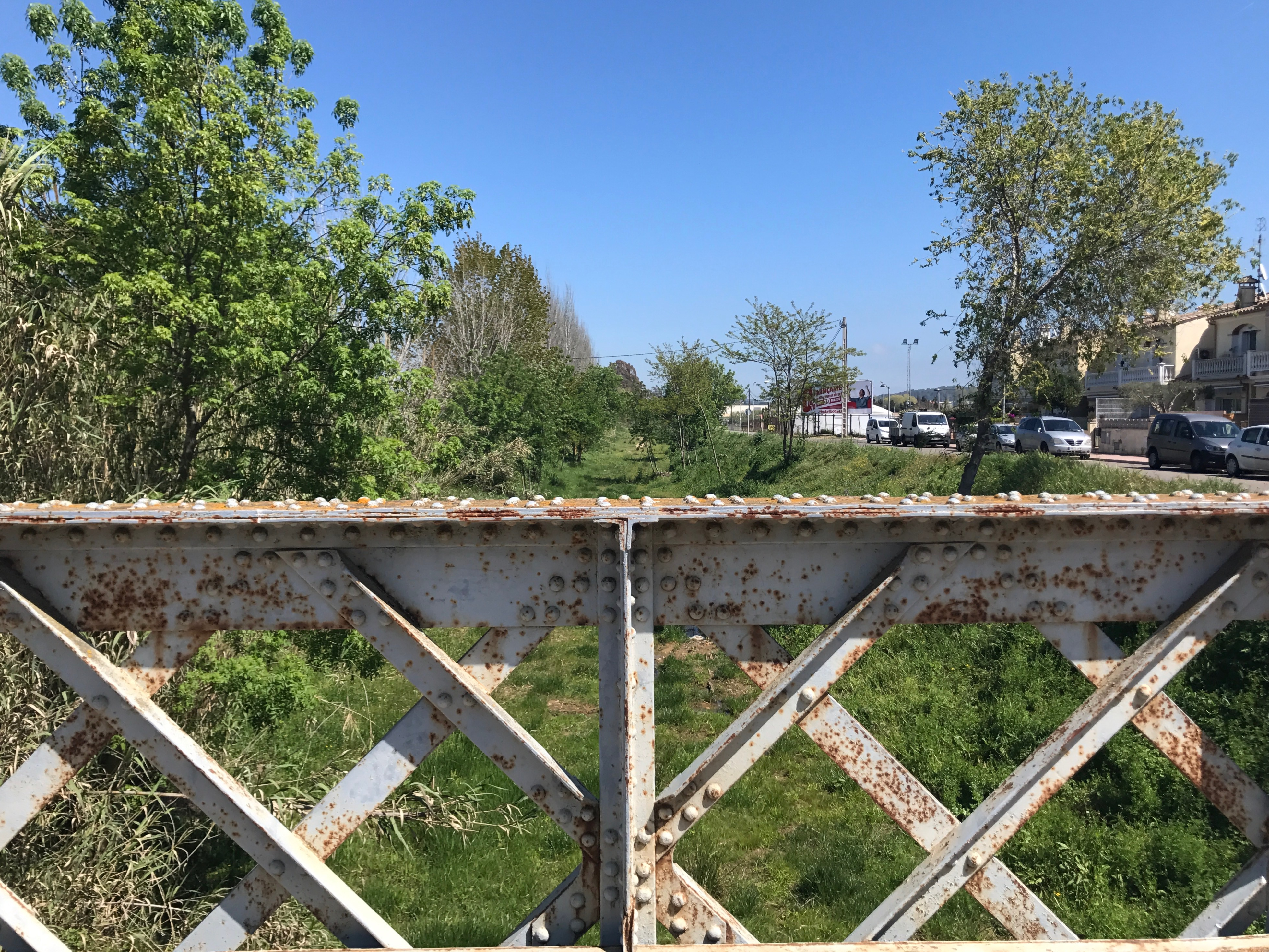 Estructura metálica de color gris un poco deteriorada